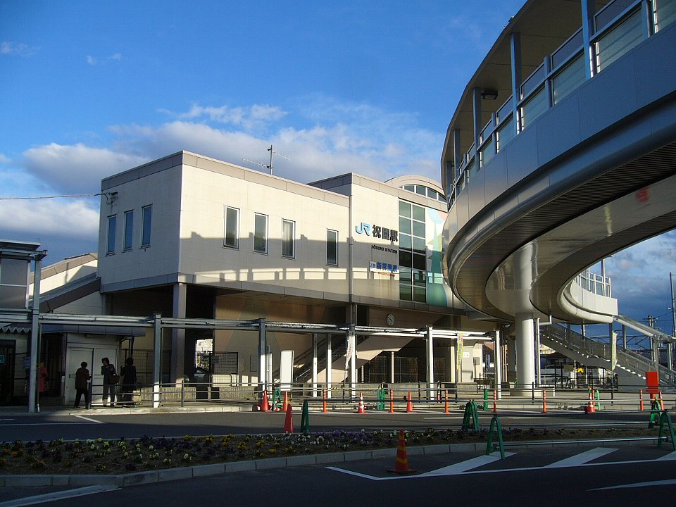 祝園駅 バスロータリーから